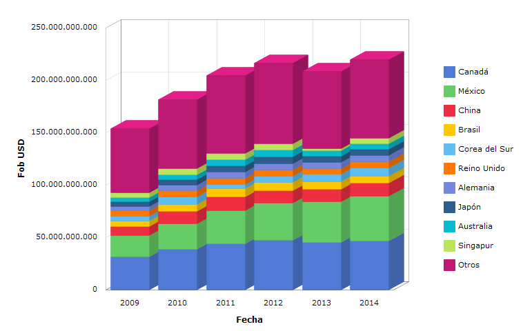 Exportación de maquinaria desde Estados Unidos. (NCE:84) Principales países importadores en los últimos años.